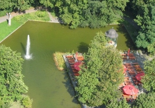 Stadtgarten Augsburg